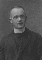 Tomáš Koupal–Blatenský (1881 - 1952), Český katolický kněz.